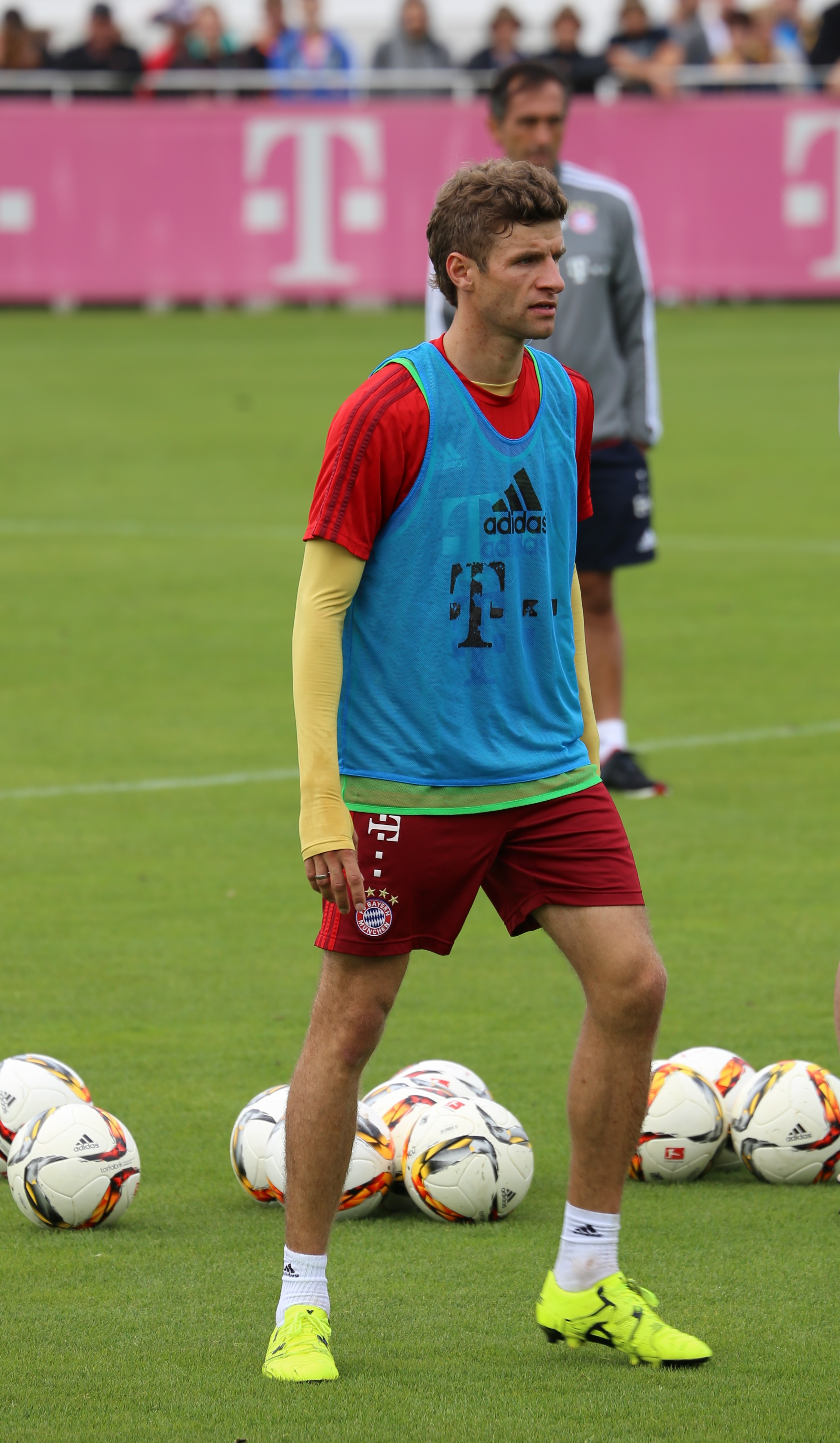 Thomas Müller beim Training auf dem Gelände des FC Bayern München